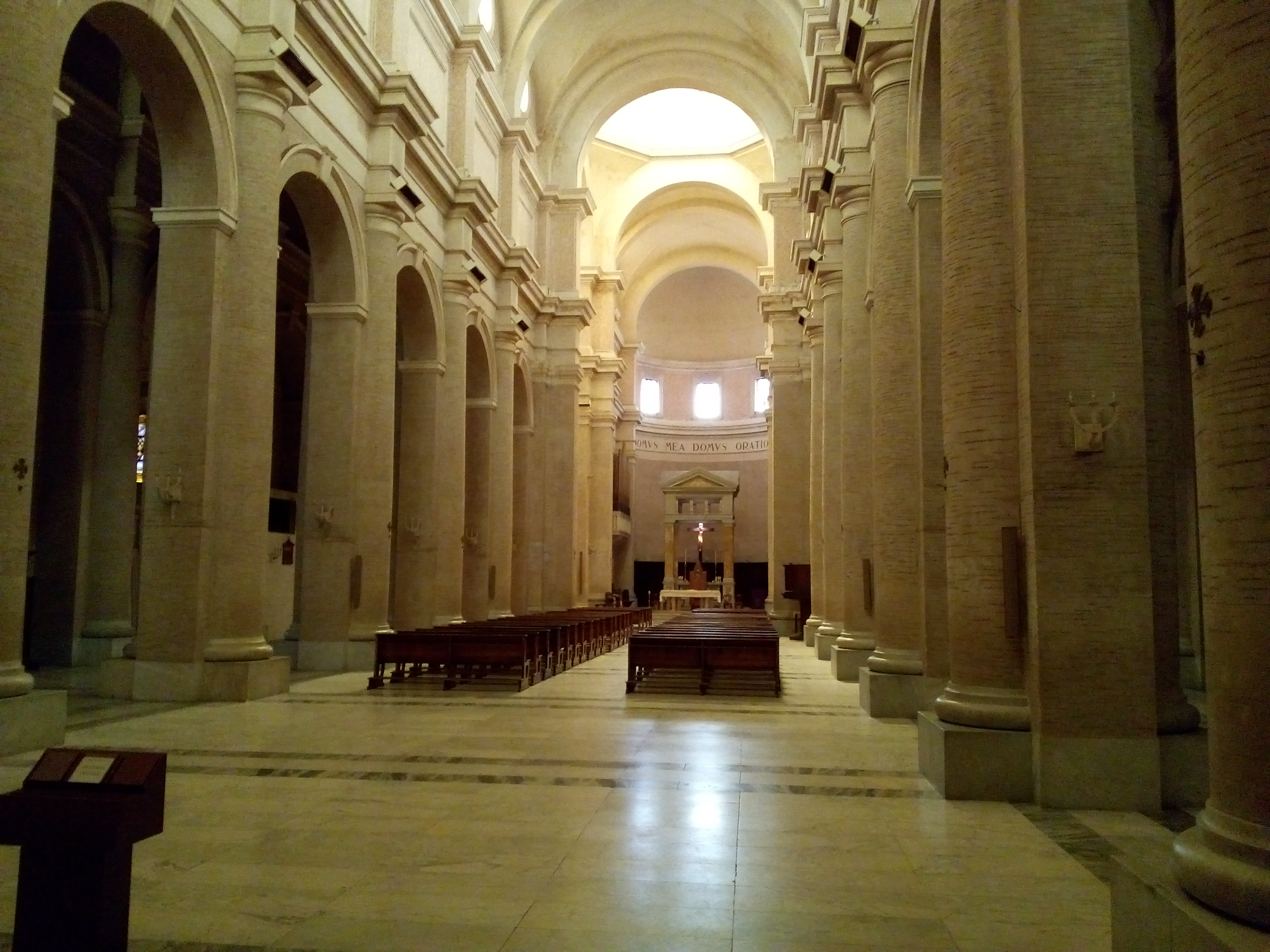 Interno della cattedrale